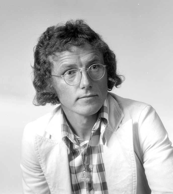 Sverre Asmervik, portrett, mann, forfatter, psykolog, brystbilde.